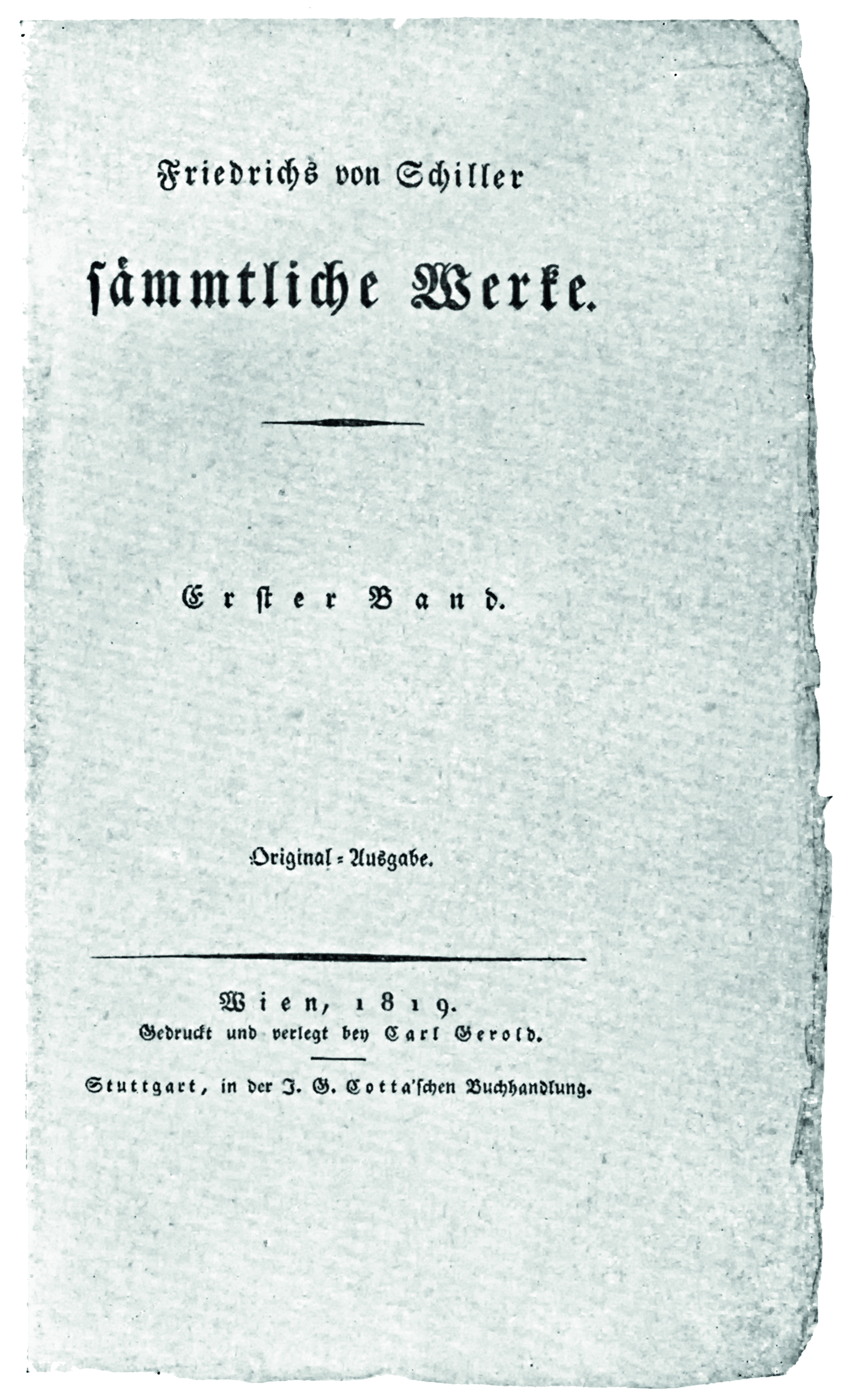 Österreichische Erstausgabe der Gesamtwerke Friedrich von Schillers, Wien Gerold, 1819